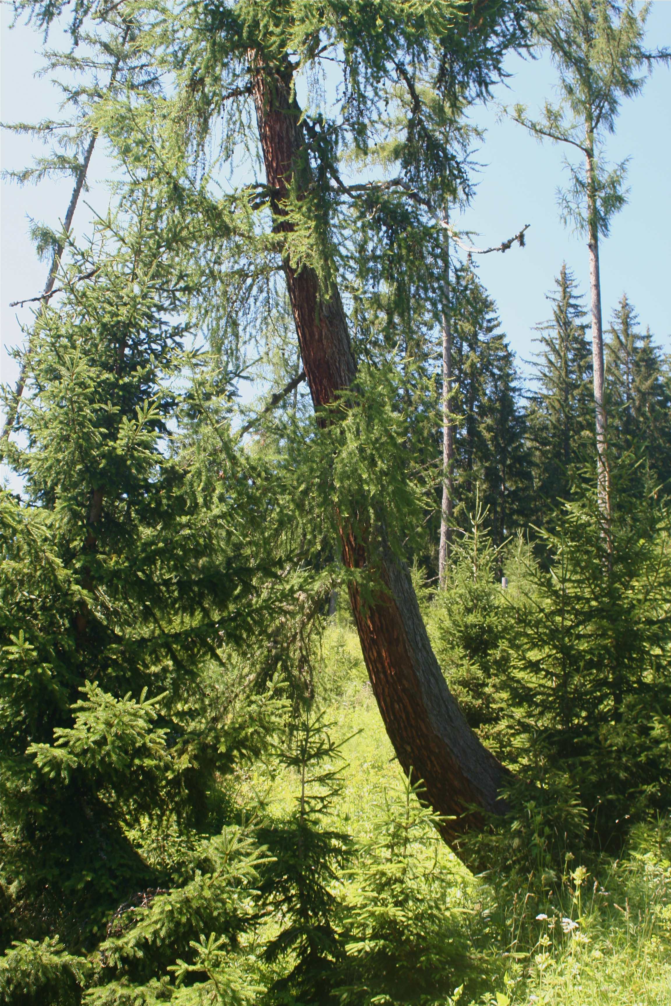 Sichelwuchs einer Lärche und weitere Bäume, die nicht im Lot stehen aufgrund der Instabilität eines sich langsam talwärts bewegenden Hanges. Ort: Wörschachwald, Steiermark, Österreich